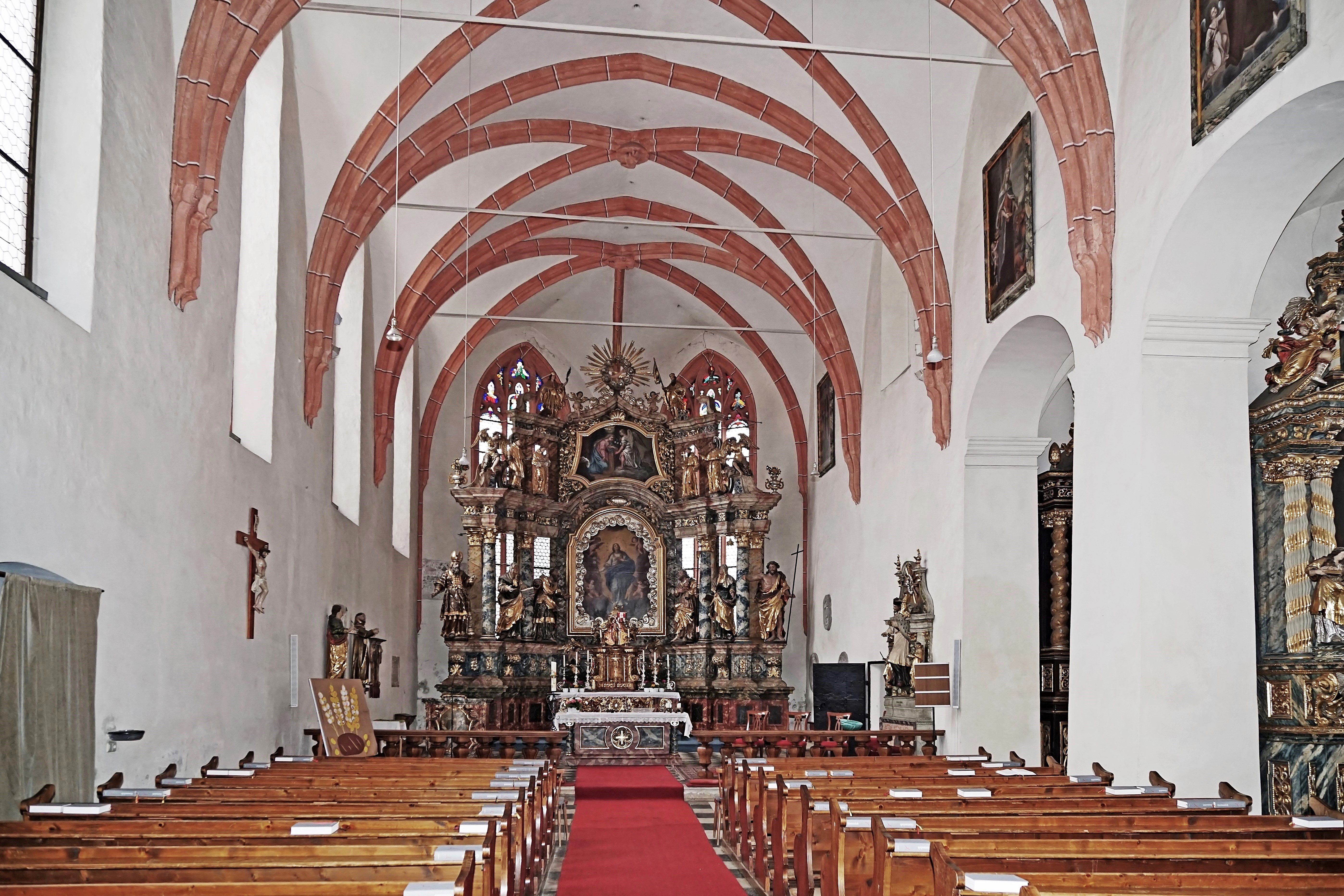 Klosterkirche Unsere Liebe Frau (St. Veit an der Glan), Innenansicht